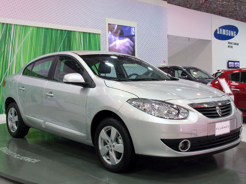 Renault Fluence 2.0 Privilege 2011